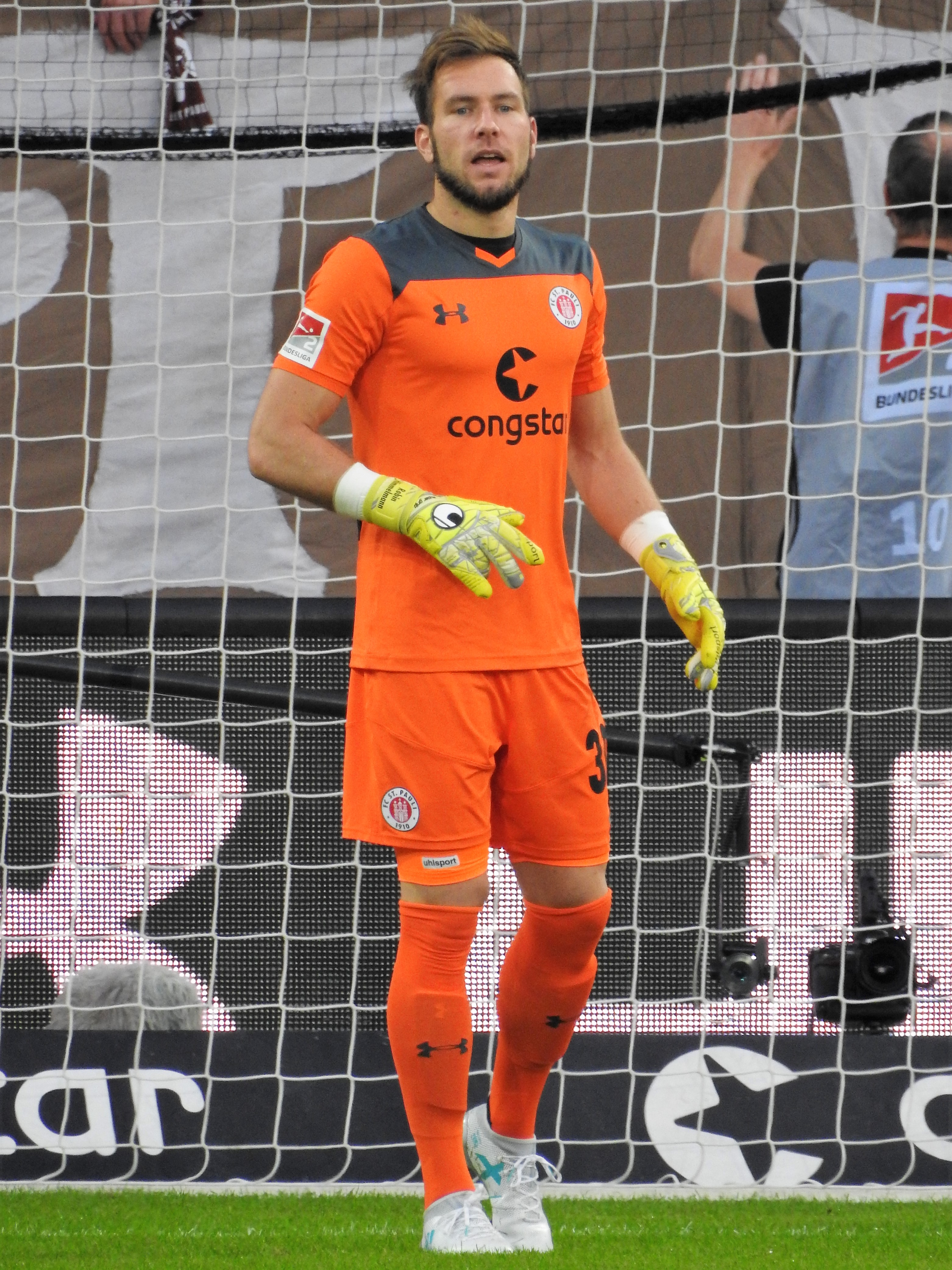 Robin Himmelmann, FC St.Pauli